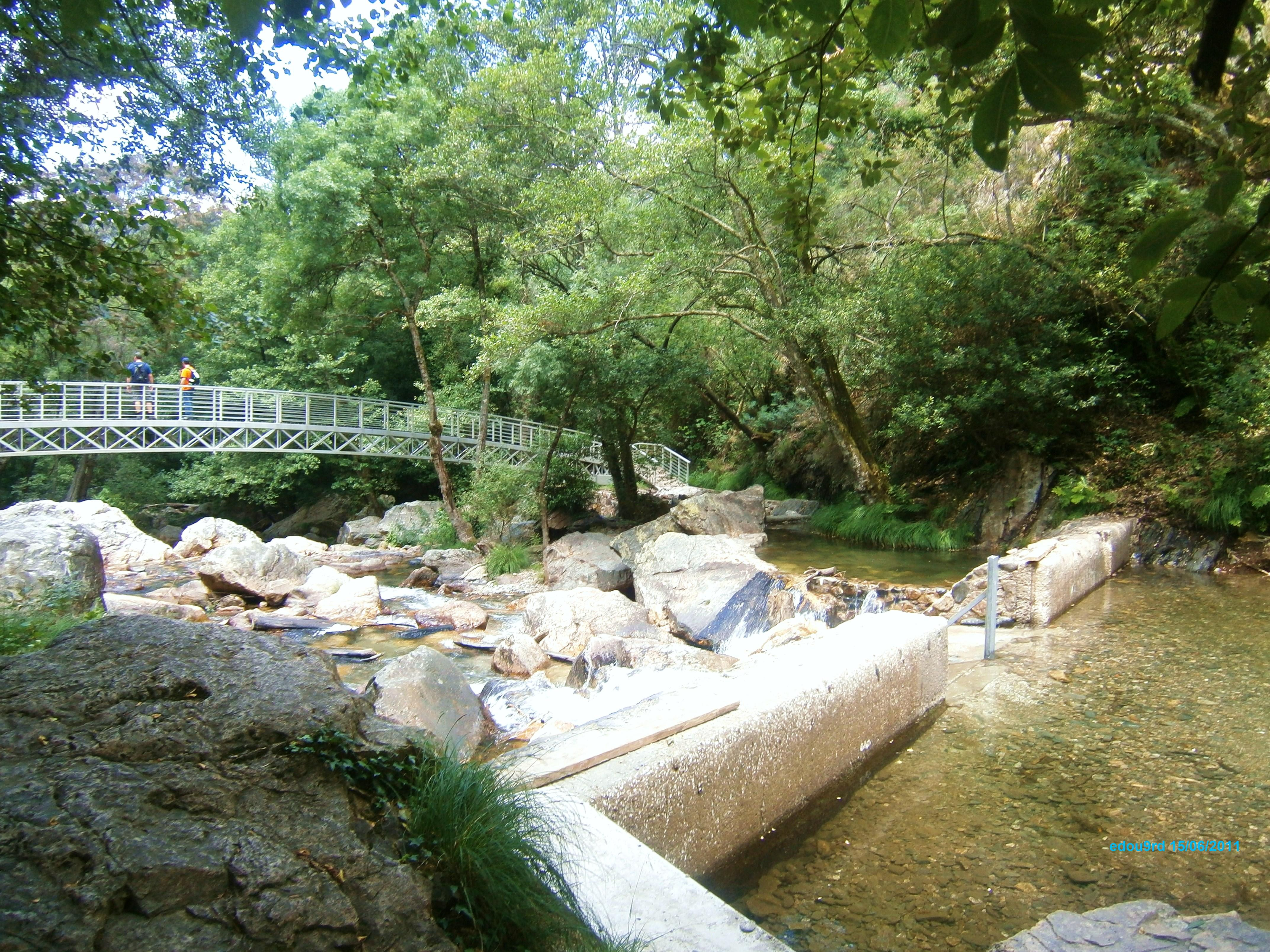 Praia Fluvial das Fragas de S. Simão